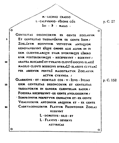 Esquema de la Tabla de los Zoelas. CIL II 2633: M(arco) Licinio Crasso / L(ucio) Calpurnio Pisone co(n)s(ulibus) / IIII K(alendas) Maias / gentilitas Desoncorum ex gente Zoelarum / et gentilitas Tridiavorum ex gente idem / Zoelarum hospitium vetustum antiquom(!) / renovaverunt eique omnes ali(u)s alium in fi/dem clientelamque suam suorumque libero/rum posterorumque receperunt egerunt / Araus Ablecaeni et Turaius Clouti Docius Elaesi / Magilo Clouti Bodecius Burrali Elaesus Clutami / per Abienum Pentili magistratum Zoelarum actum Curunda / Glabrione et Homullo co(n)s(ulibus) V Idus Iulias / idem gentilitas Desoncorum et gentilitas / Tridiavorum in eandem clientelam eadem / foedera recepunt ex gente Avolvigorum / Sempronium Perpetuum Orniacum et ex gente / Visaligorum Antonium Arquium et ex gente / Cabruagenigorum Flavium Frontonem Zoelas / egerunt / L(ucius) Domitius Silo et / L(ucius) Flavius Severus / Asturicae